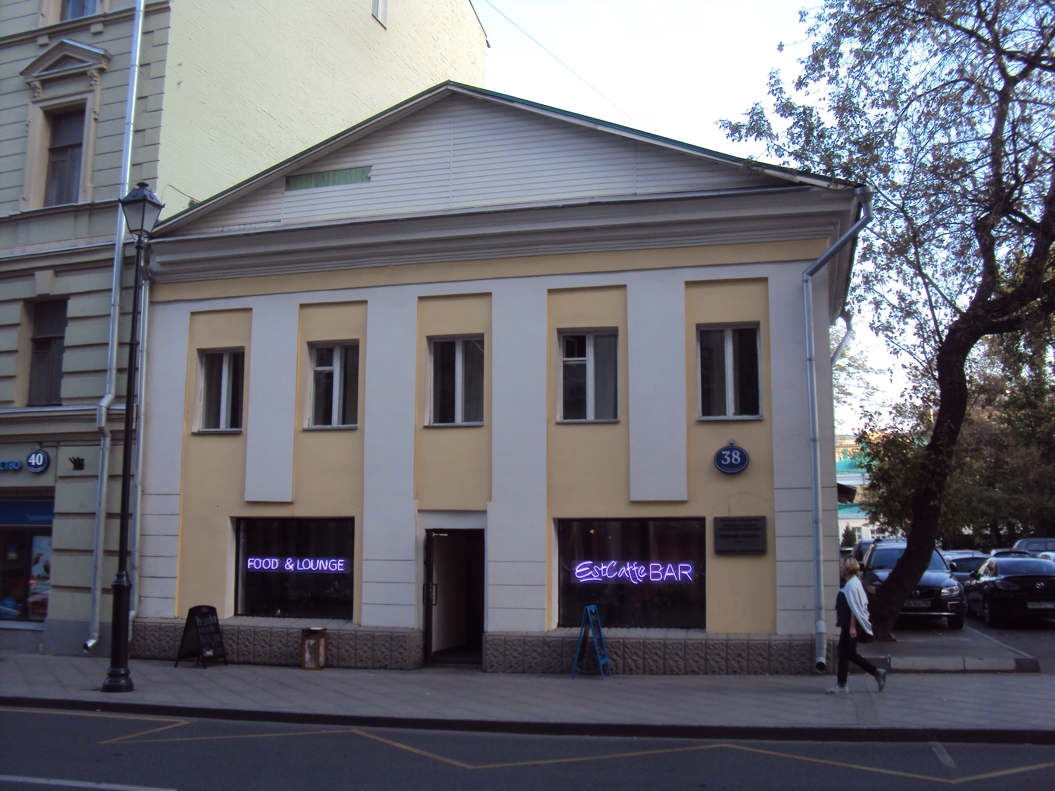 Флигель: Покровка ул., дом 38, строение 5, Басманный, Центральный округ, Москва